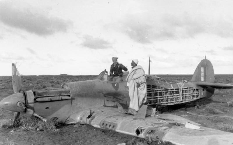 Der erfolgreichste Kampfflieger an der afrikanischen Front, Ritterkreuzträger Leutnant Marseille, der in der Zwischenzeit seinen 50. Abschuss tätigen konnte, mit der Feindmaschine, die er bei seinem 48. Luftsieg herunterholte. 31-3-42 [Herausgabedatum]-de-gu-schm PK-Aufnahme: Kriegsberichter Oppitz